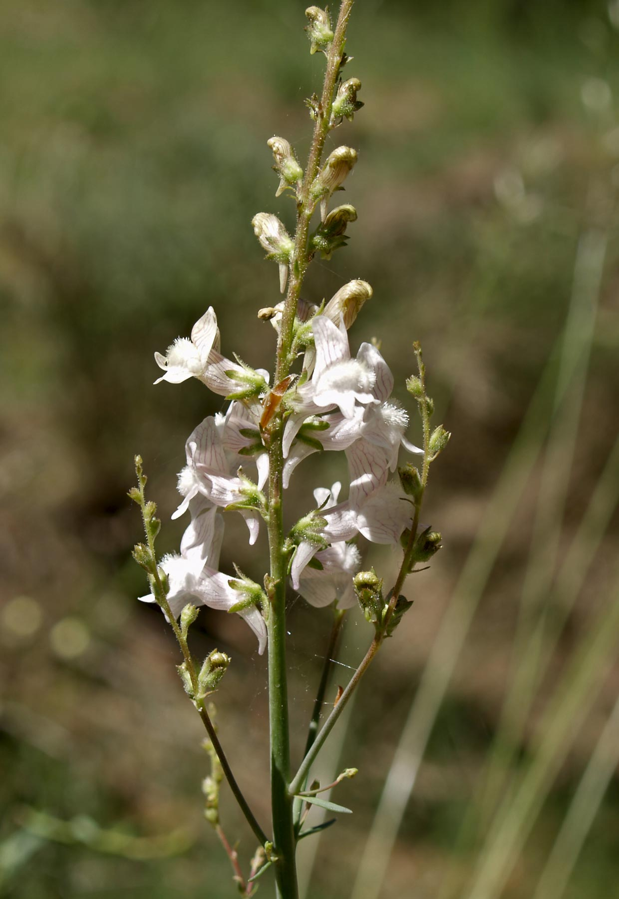 Linaria nivea, Puerto de Canencia, Madrid.